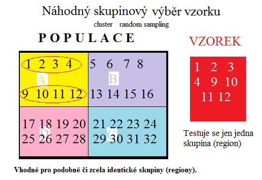 Náhodný skupinový výběr